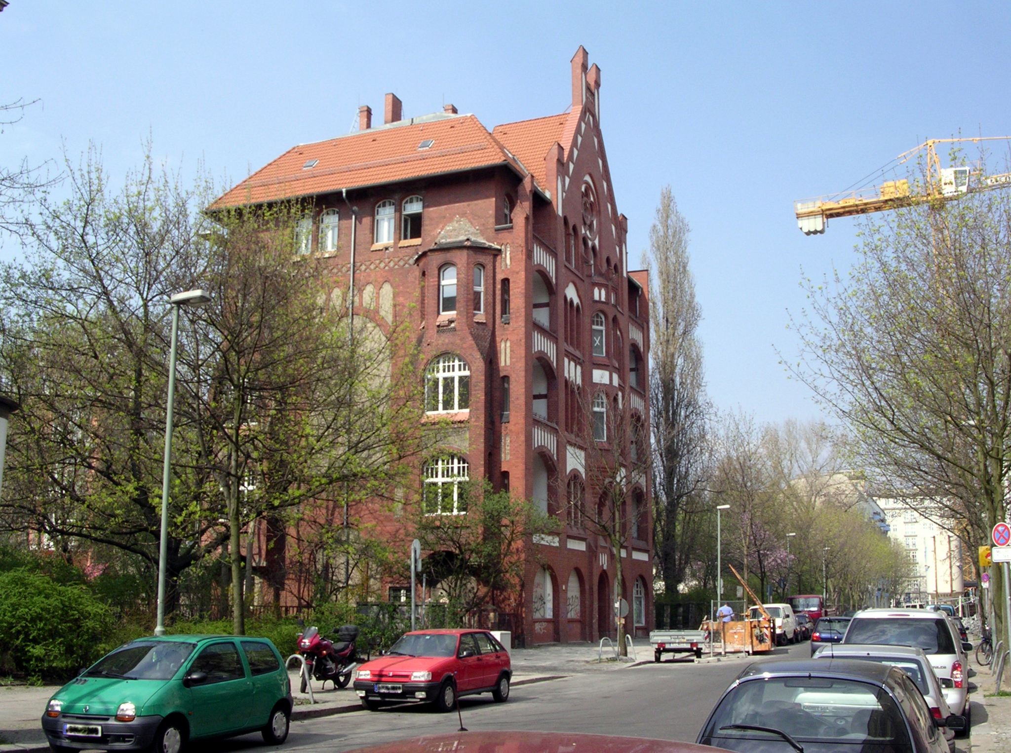 Das heute denkmalgeschützte prunkvolle Wohn- und Geschäftshaus Kadiner Straße 11 im Stil der märkischen Backsteingotik wurde 1903–1904 nach Entwürfen des Architekten H. Heinig unter Leitung des Architekten Johannes Ernst für den Malermeister Wilhelm Lohmann errichtet. Erhalten sind von dem ursprünglichen Komplex mit Seitenflügeln und Quergebäude nur das Vorderhaus und ein Teil des Seitenflügels. Im Jahr 2000 wurde das Gebäude modernisiert und instandgesetzt. Da es sich "dem Charakter des Kirchenbaus" , der an der Ecke Grünberger Straße entstehen sollte "in Stil und Material anzupassen" hatte, erinnert es heute an die im Krieg zerstörte Lazaruskirche, auch "Dom des Ostens genannt", deren Ruine 1949 gesprengt wurde.